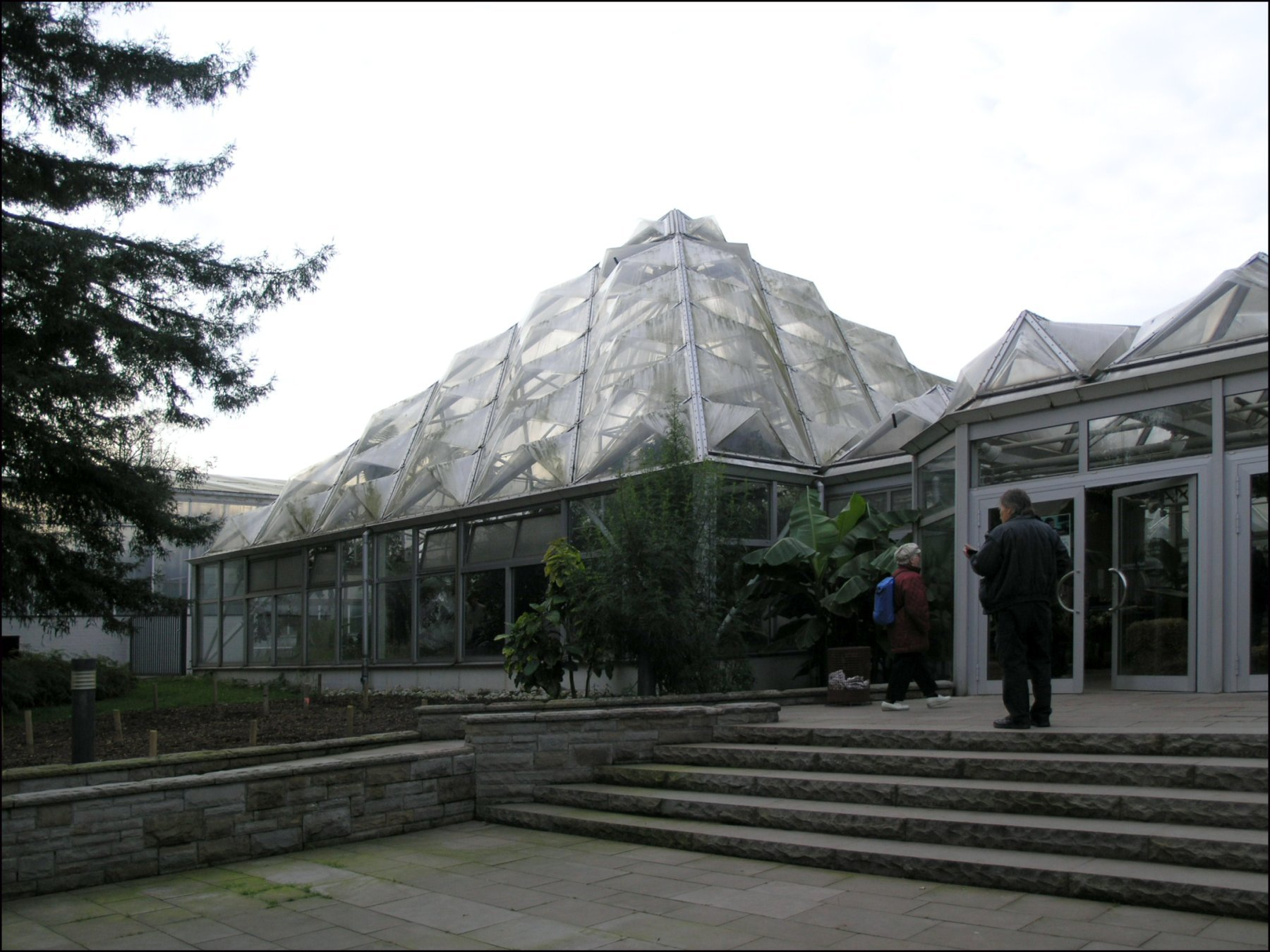 Grugapark (Essen, Germany)